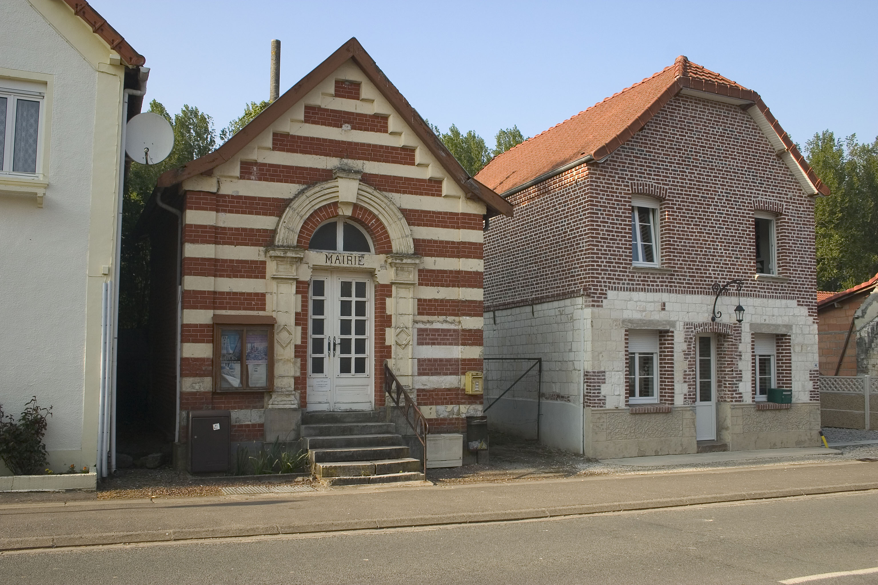 La Mairie de Berles-Monchel avant restauration